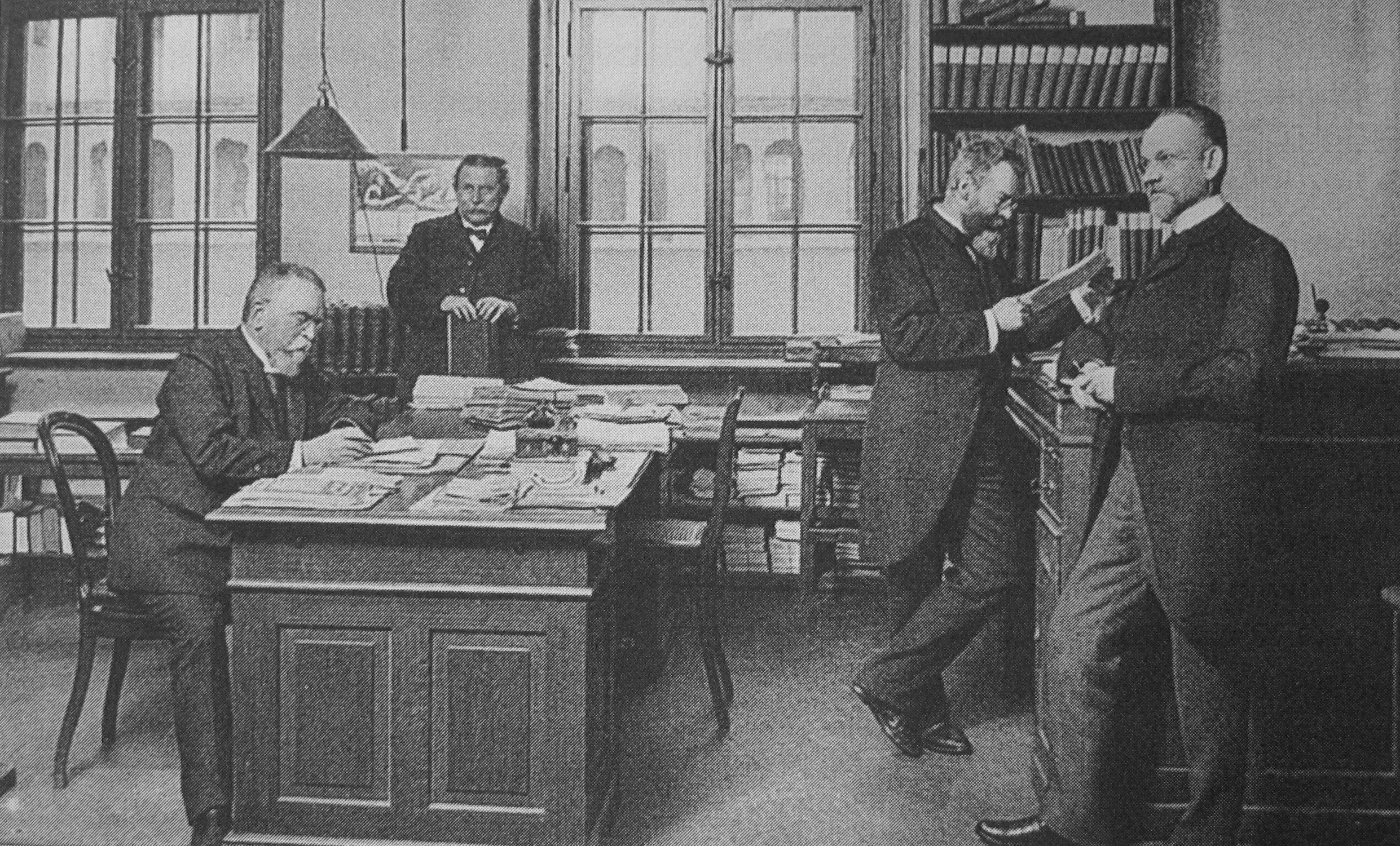 Redakteure von Meyers Konversationslexikon, Büro in Leipzig, 1913